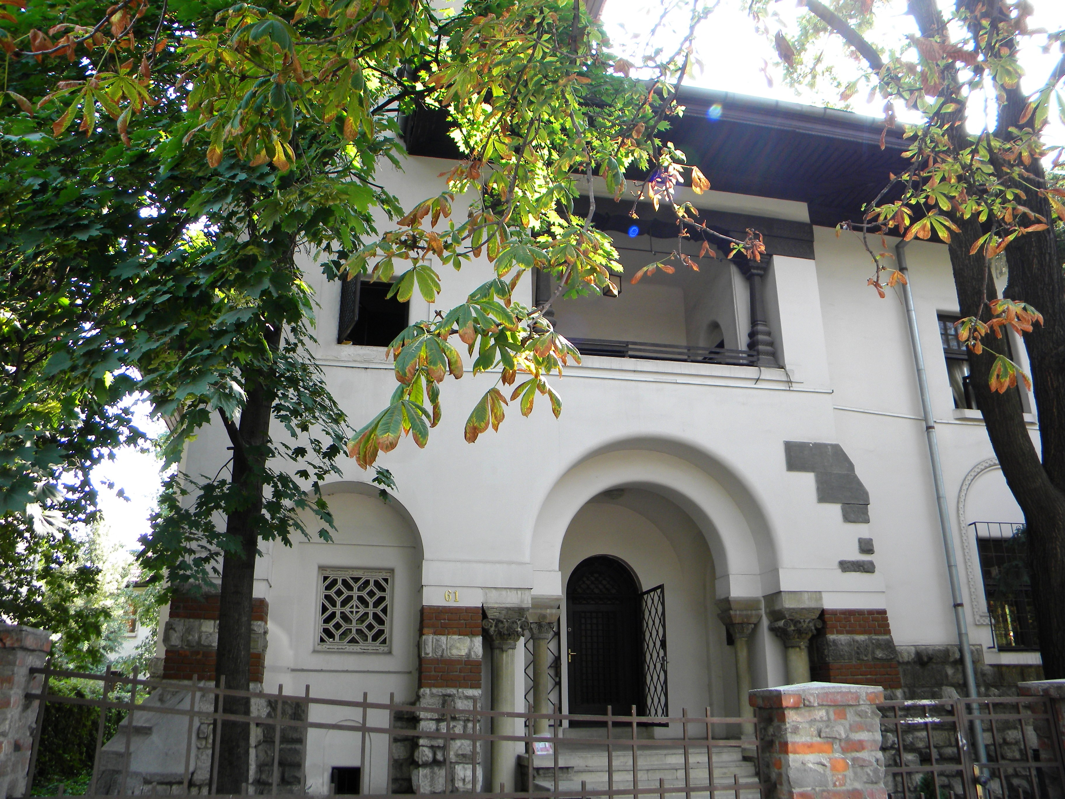 Casa pe Str. Eroii Sanitari nr. 61, Bucuresti Sect. 5